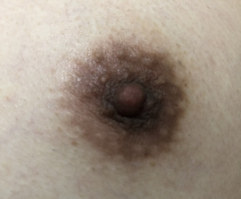 男性の乳首です。 屋内にて撮影しました。